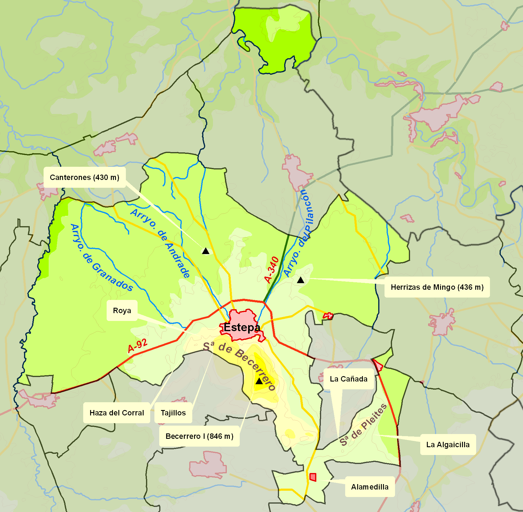 Mapa del termino municipal de Estepa (Sevilla)